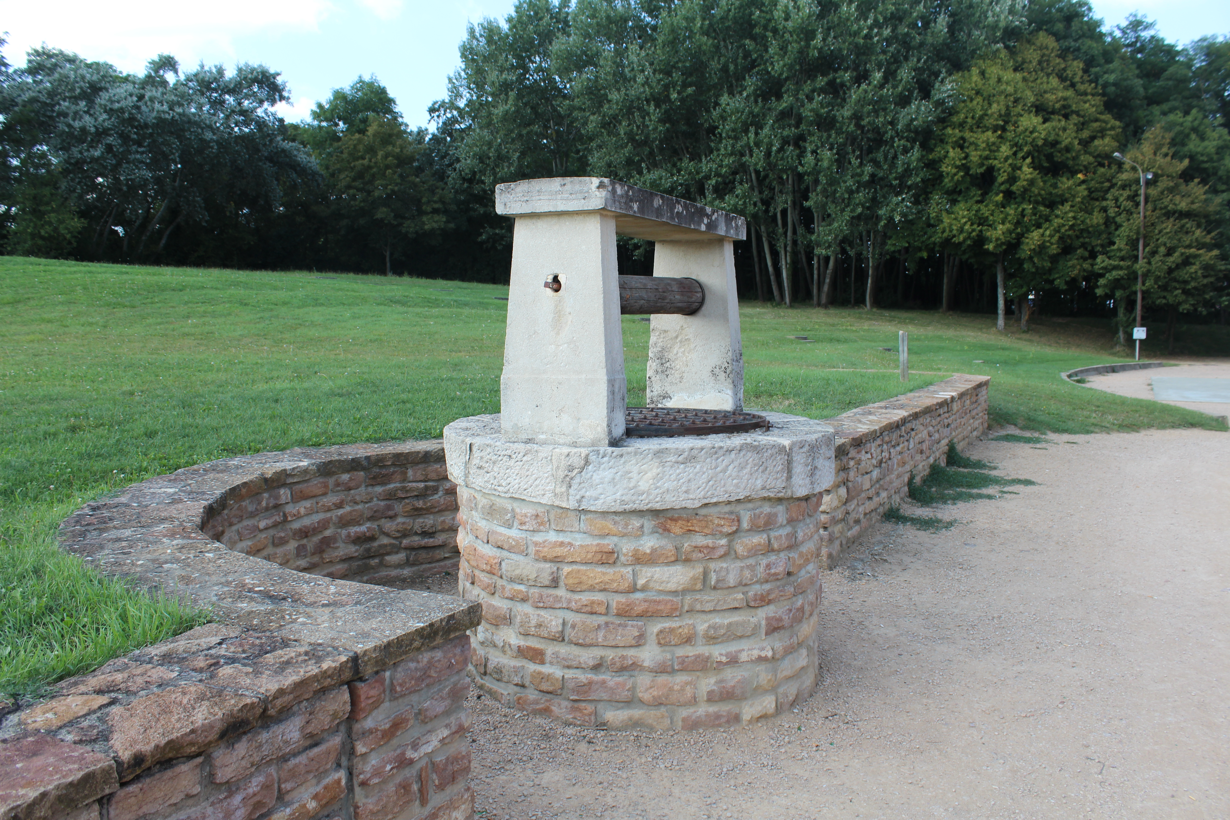 Puits du Domaine de Champgrenon à Charnay-lès-Mâcon.